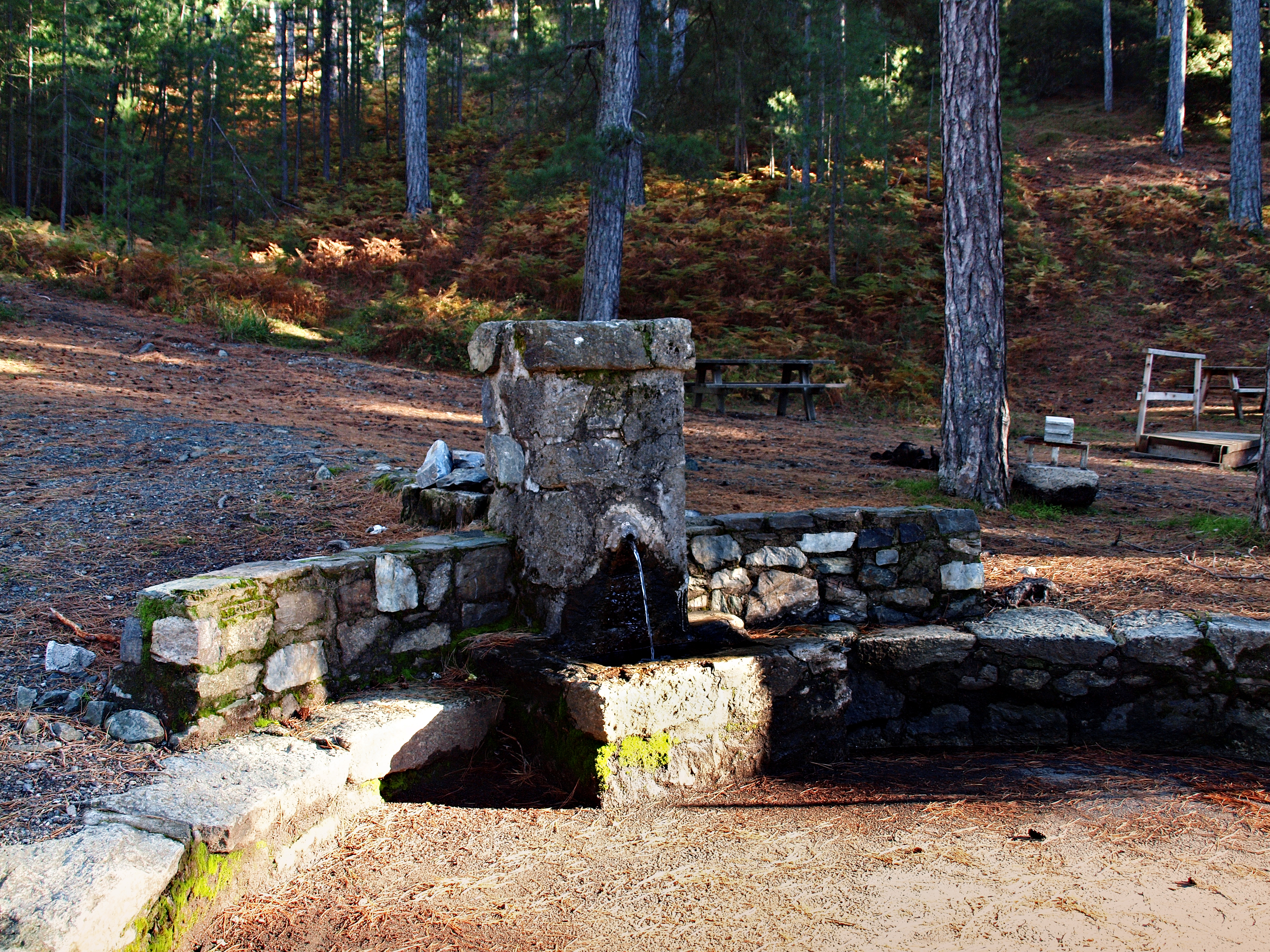 Noceta (Corsica) - Fontaine de Padule dans la forêt de Padule